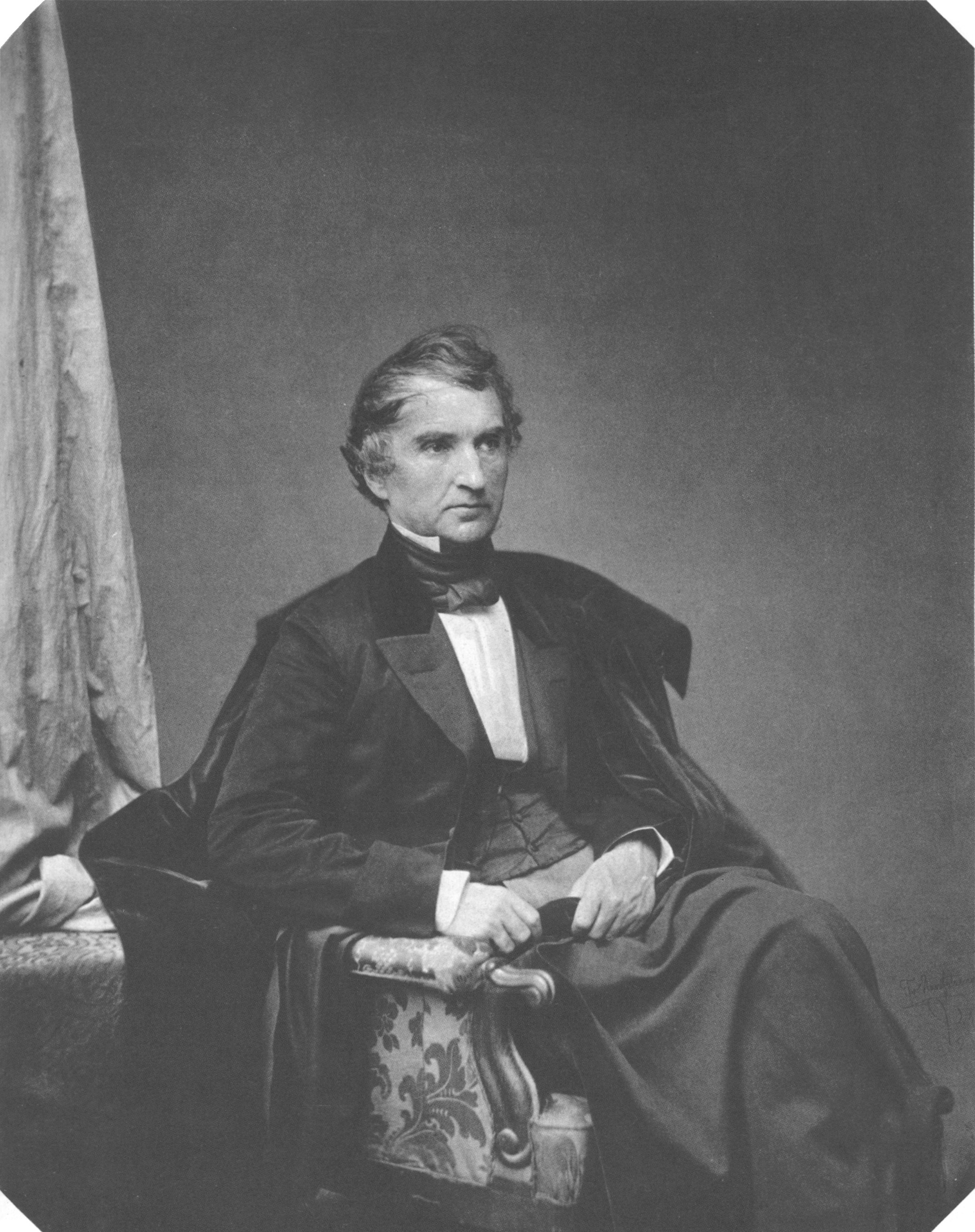 Justus von Liebig (1803-1873)